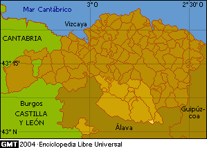 Localización de Ubidea en Vizcaya, EspañaMapa base generado con la aplicación Online Map Creation, Martin Weinelt (GMT) y límites municipales de Diputación Foral de Bizkaia (Cartografía y planes urbanísticos)